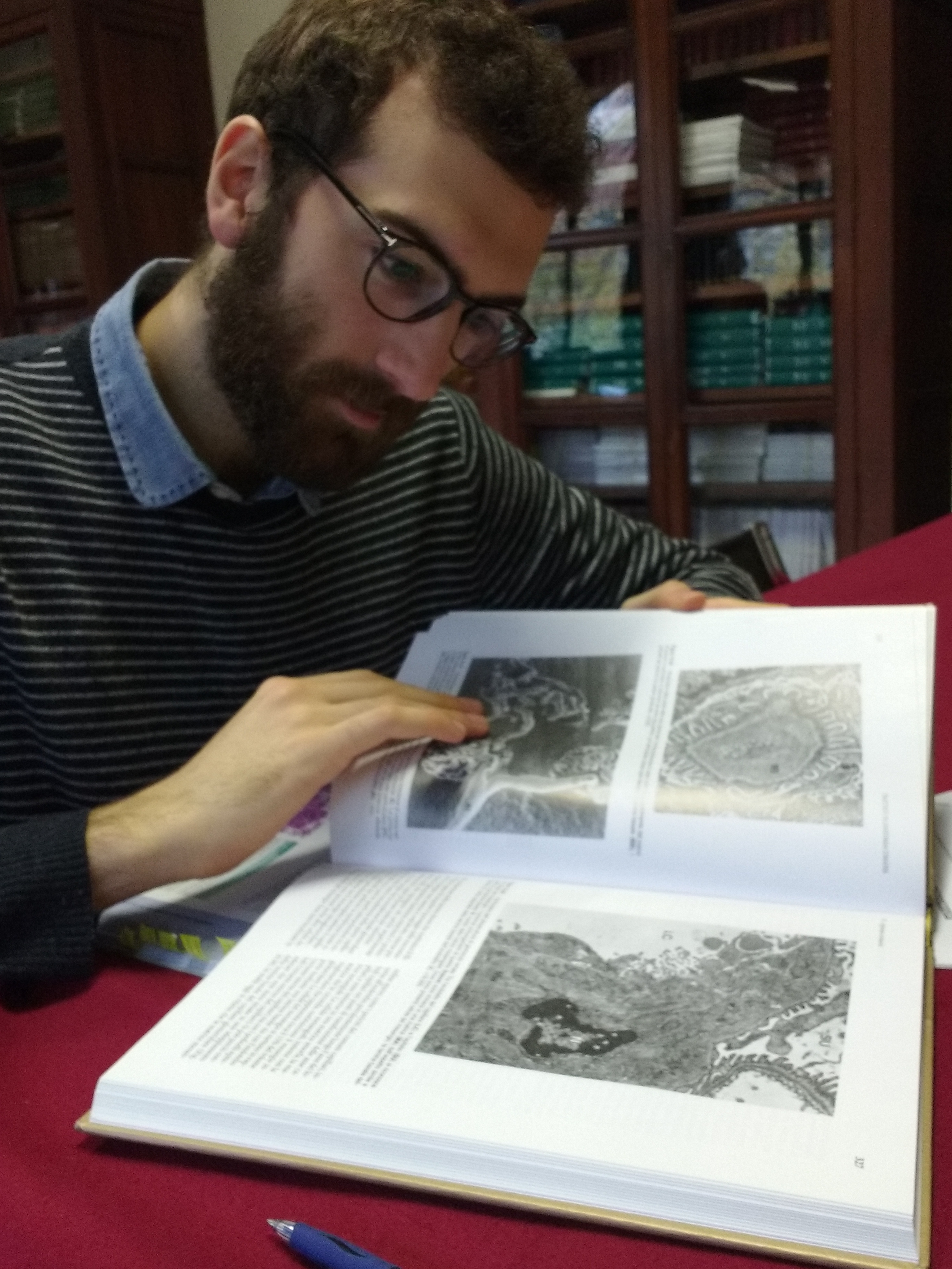 Uno studente di anatomia alle prese con il secondo tomo del Trattato di Anatomia Umana EdiErmes